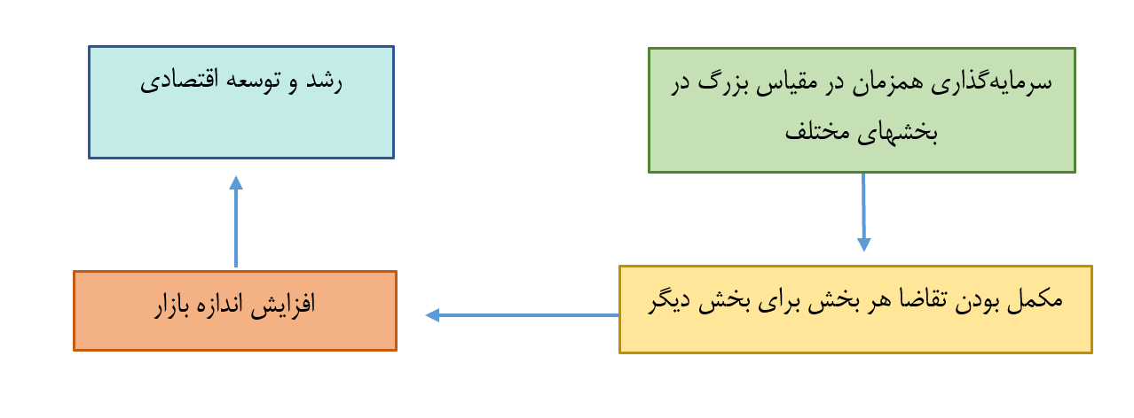 فرآیند توسعه اقتصادی از دید نظریه رشد متعادل راگنار نورکس